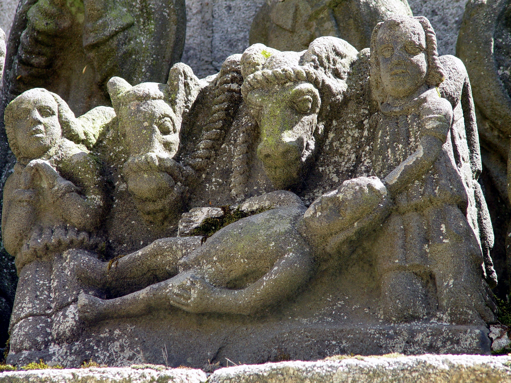 Calvaire in Kergrist-Moelou (Bretagne, Cotes d'Armor), Detail: Geburt Christi